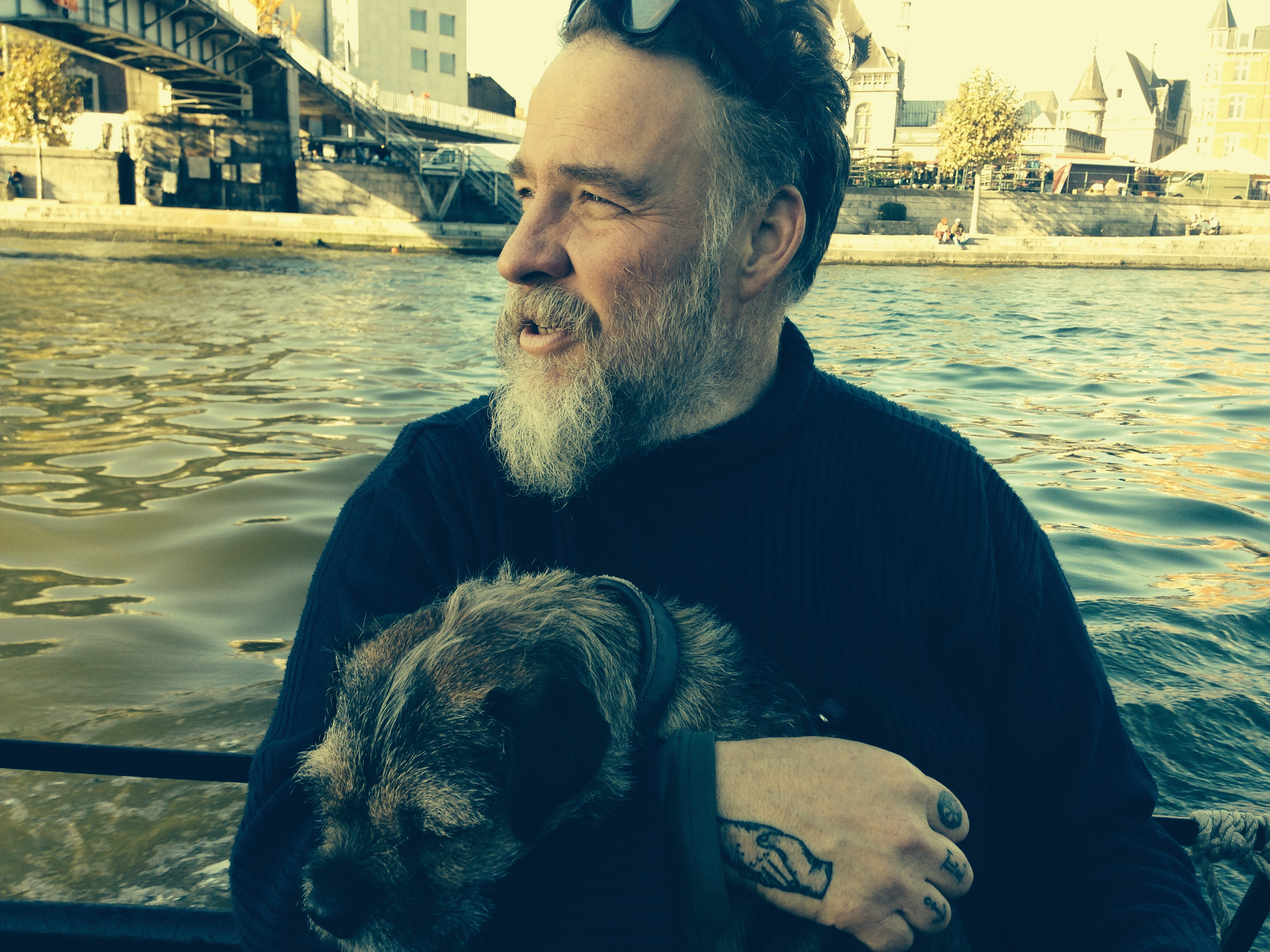 Bouli Lanners, réalisateur